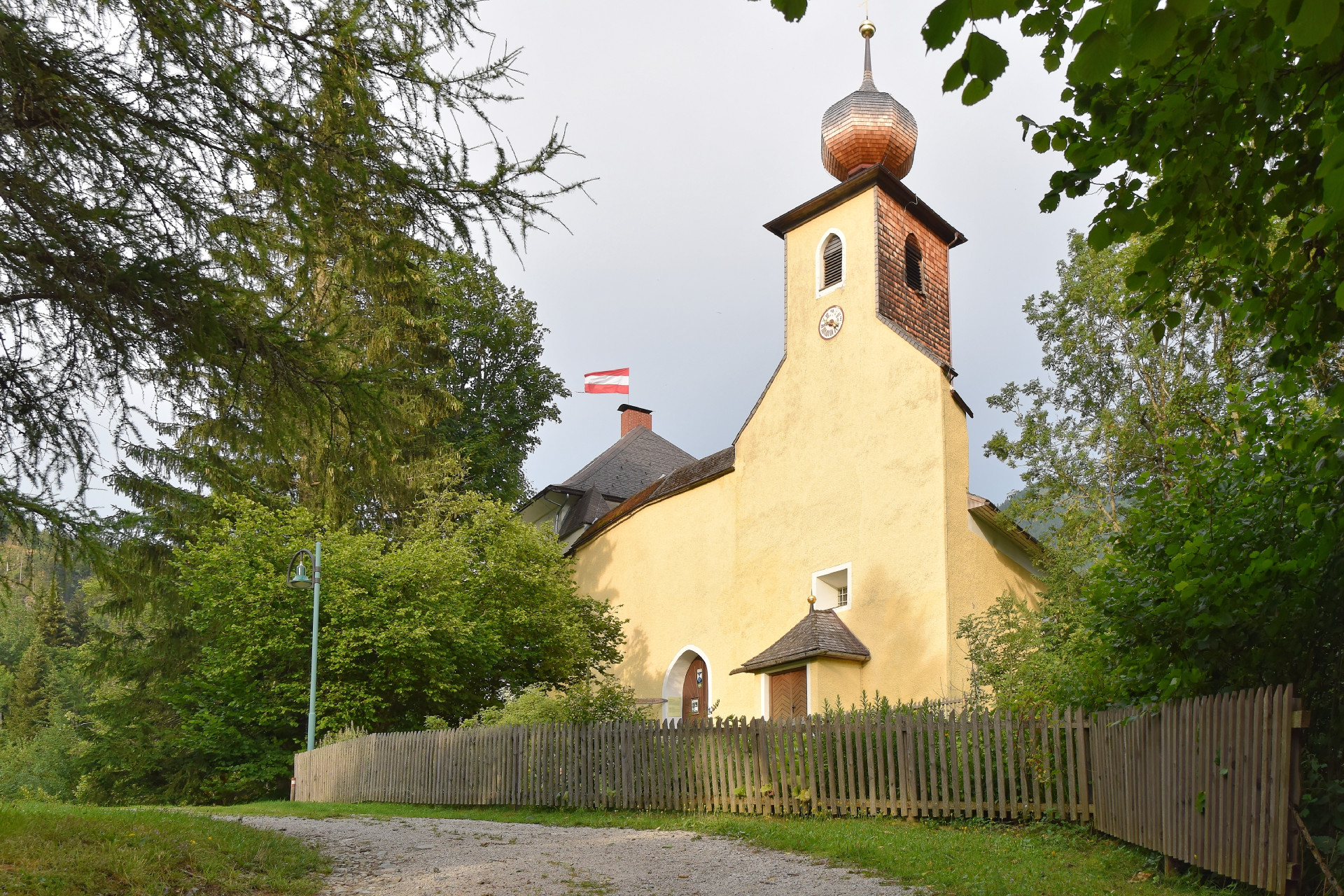 Pfarrkirche hl. Leonhard; Pfarrhof, ehem. Schloss